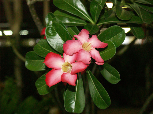 Adenium obesum eigen foto